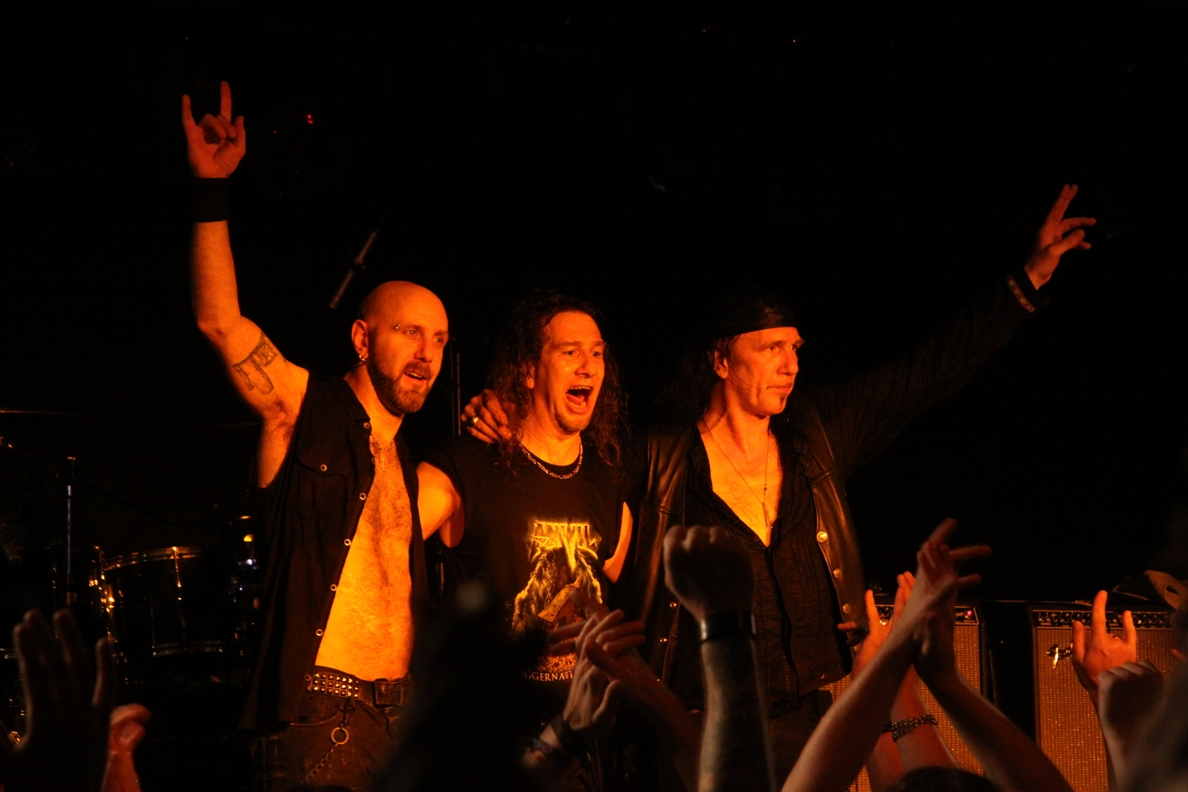 ANVIL Live im Colossaal Aschaffenburg , Glenn "Five" Gyorffy, Steve "Lips" Kudlow, Robb Reiner